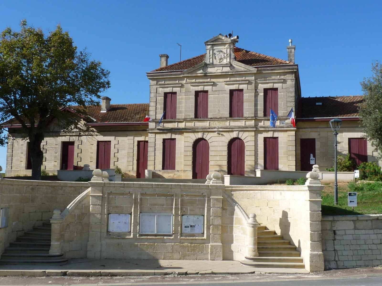 Mairie de Saint-Ciers-de-Canesse, Gironde, France